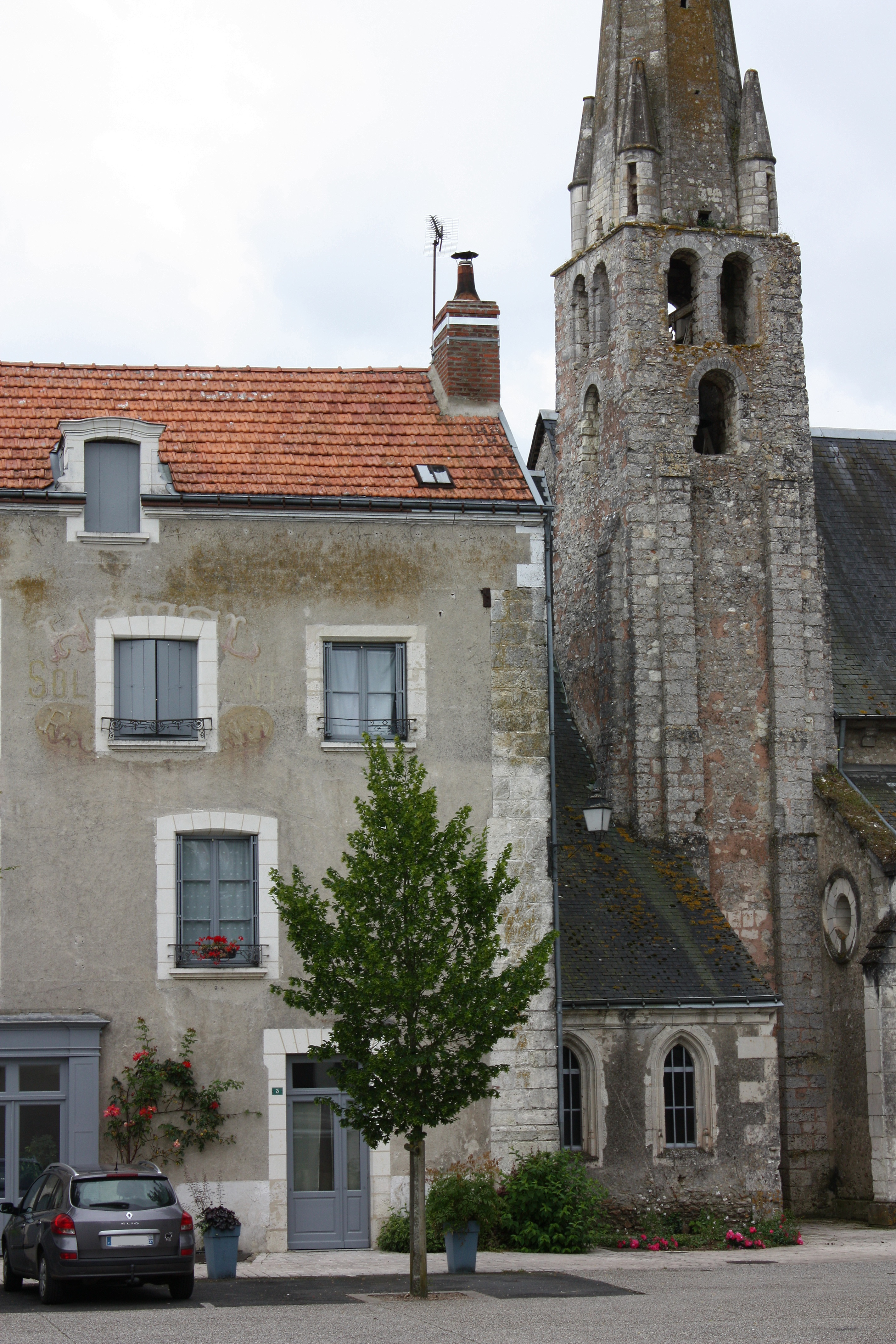 Tauxigny - Eglise Saint-Martin